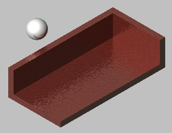 liaison par associations de ponctuelles